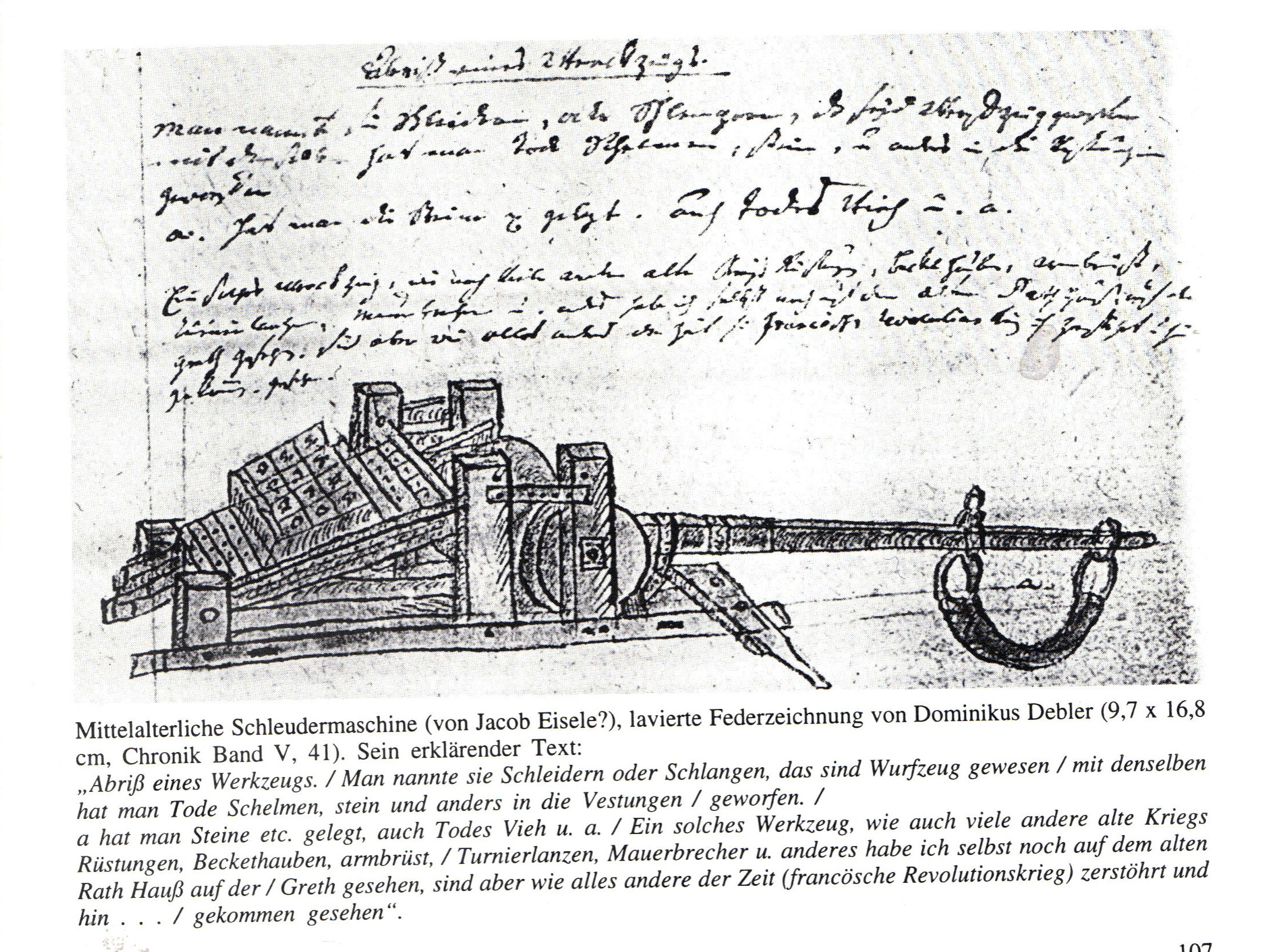 Mittelalterliche Schleudermaschine, Zeichnung in der Schwäbisch Gmünder Chronik von Dominikus Debler (um 1800), Stadtarchiv Schwäbisch Gmünd, Bd. 5, S. 41, Illustration zum Versprechen (1450)des im Städtekrieg (Schlacht bei Waldstetten) gefangengenommenen Werkmeisters Jakob Eisele an Graf Ulrich von Württemberg, ihm zwei "werfende Handwerke" zu bauen